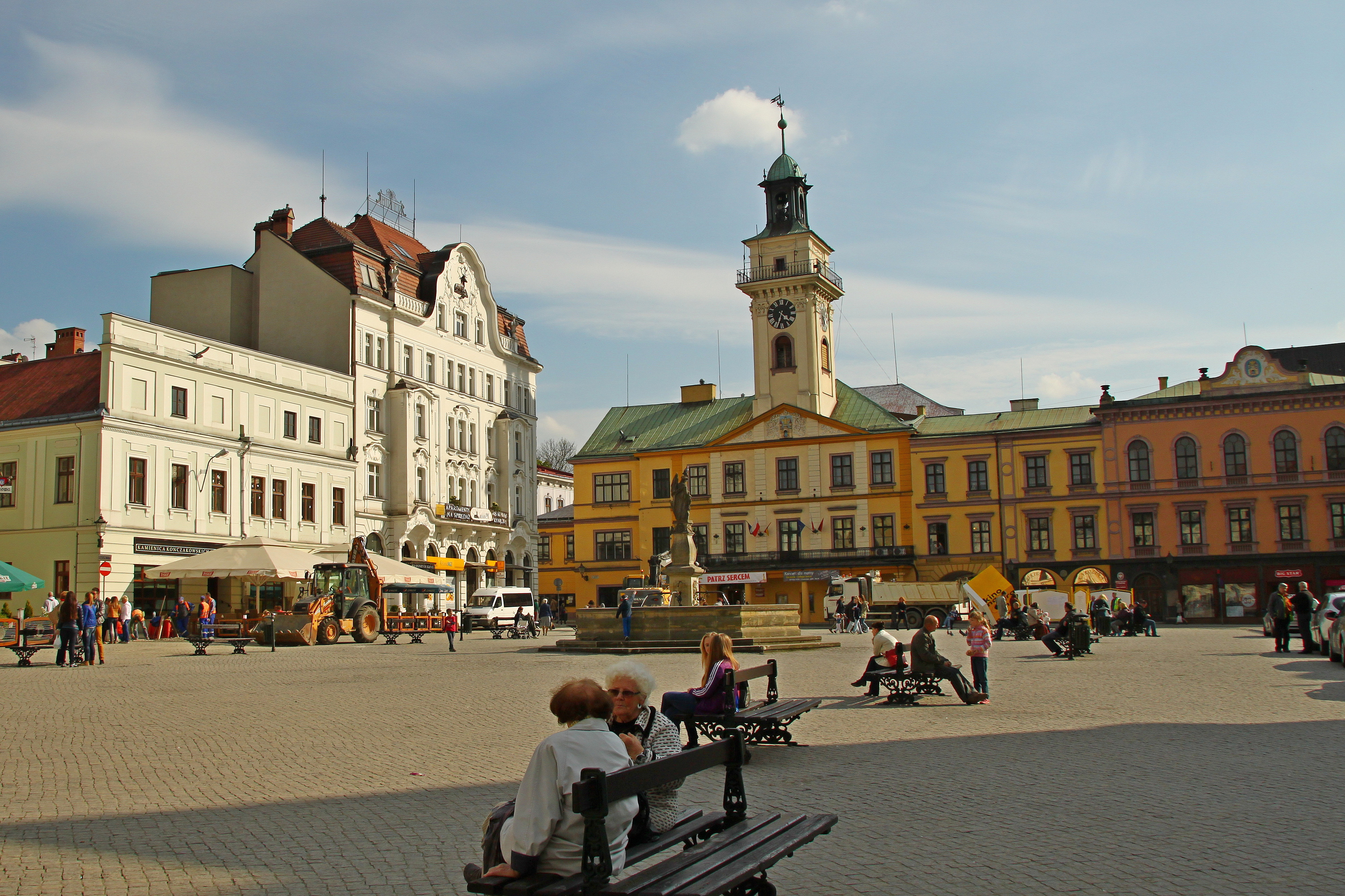 Cieszyn, ratusz, 1496, 1661, 1670, 1720, 1800, 1846